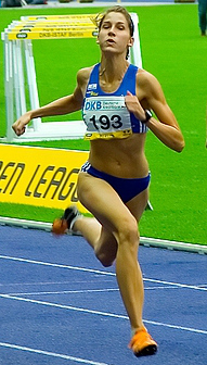 100m B-Lauf ISTAF 2006: Jala Gangnus